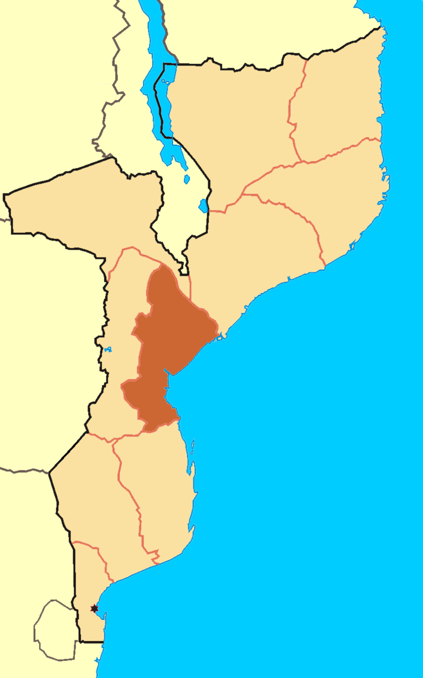 Mapa ilustrativo - Província de Sofala (Moçambique)